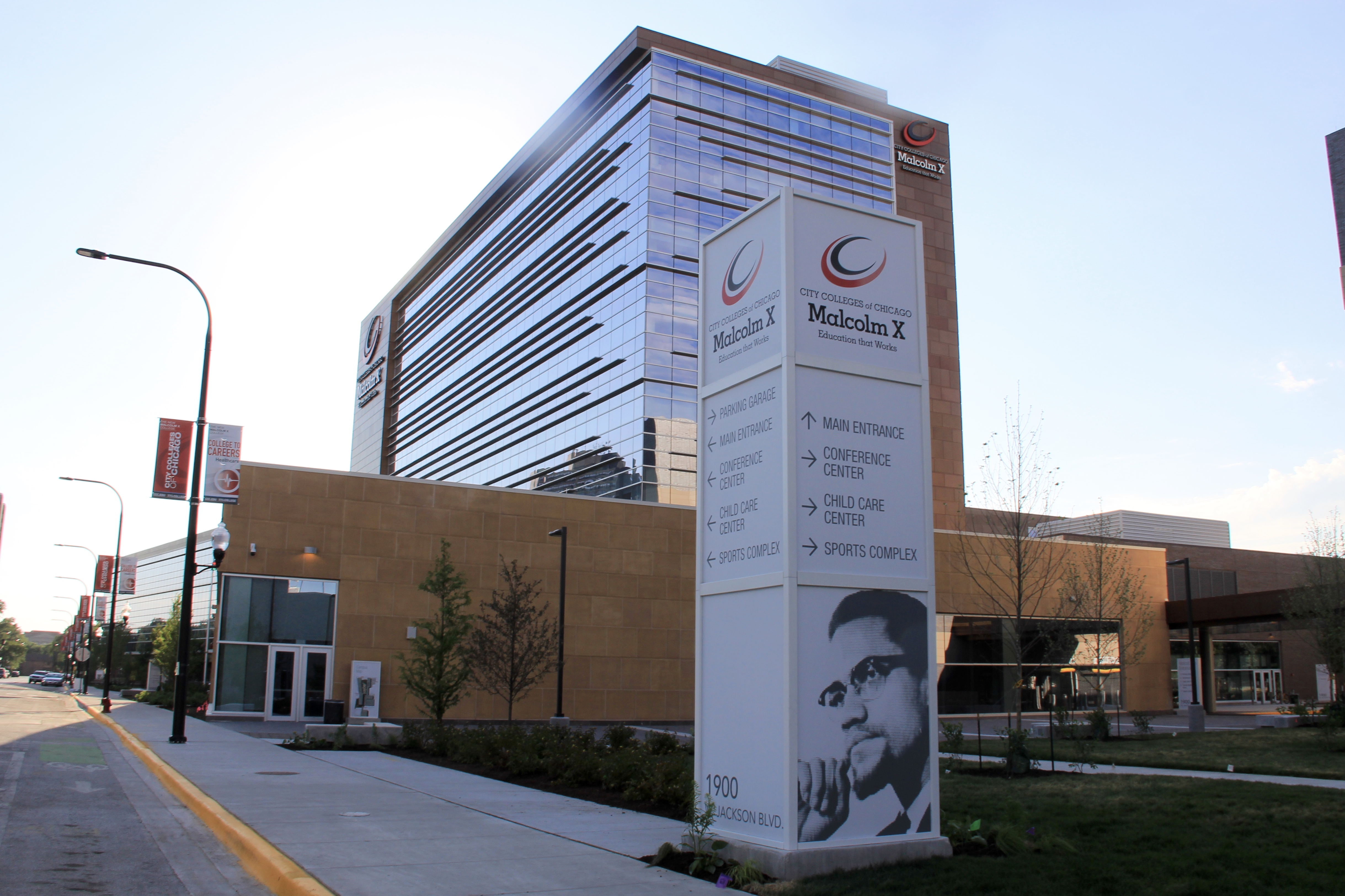 Malcolm X College